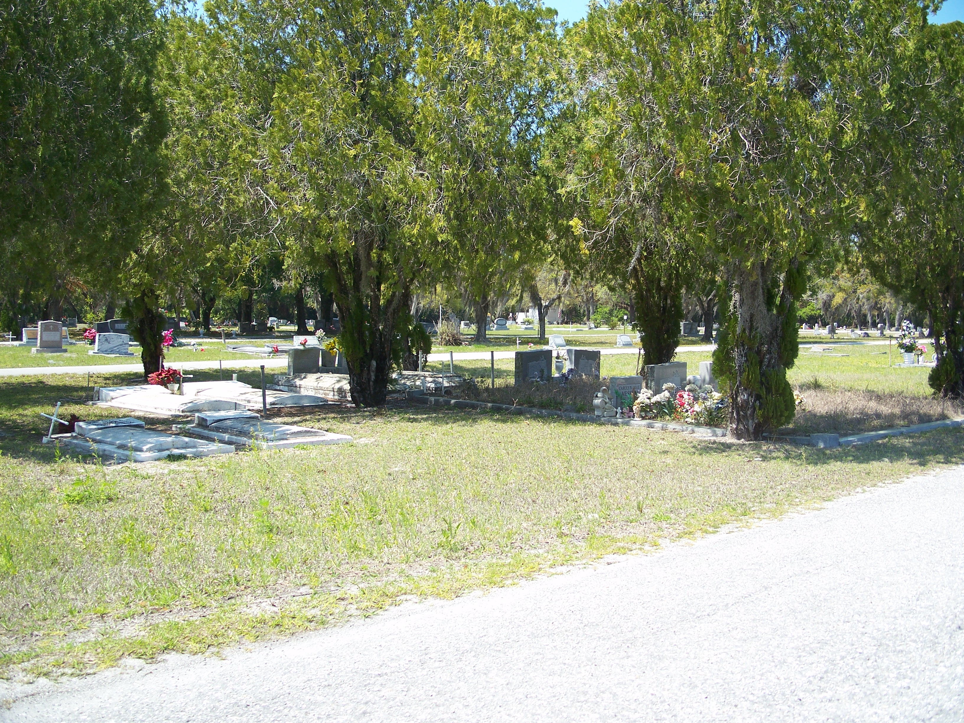 Fort Denaud, Florida: Cemetery